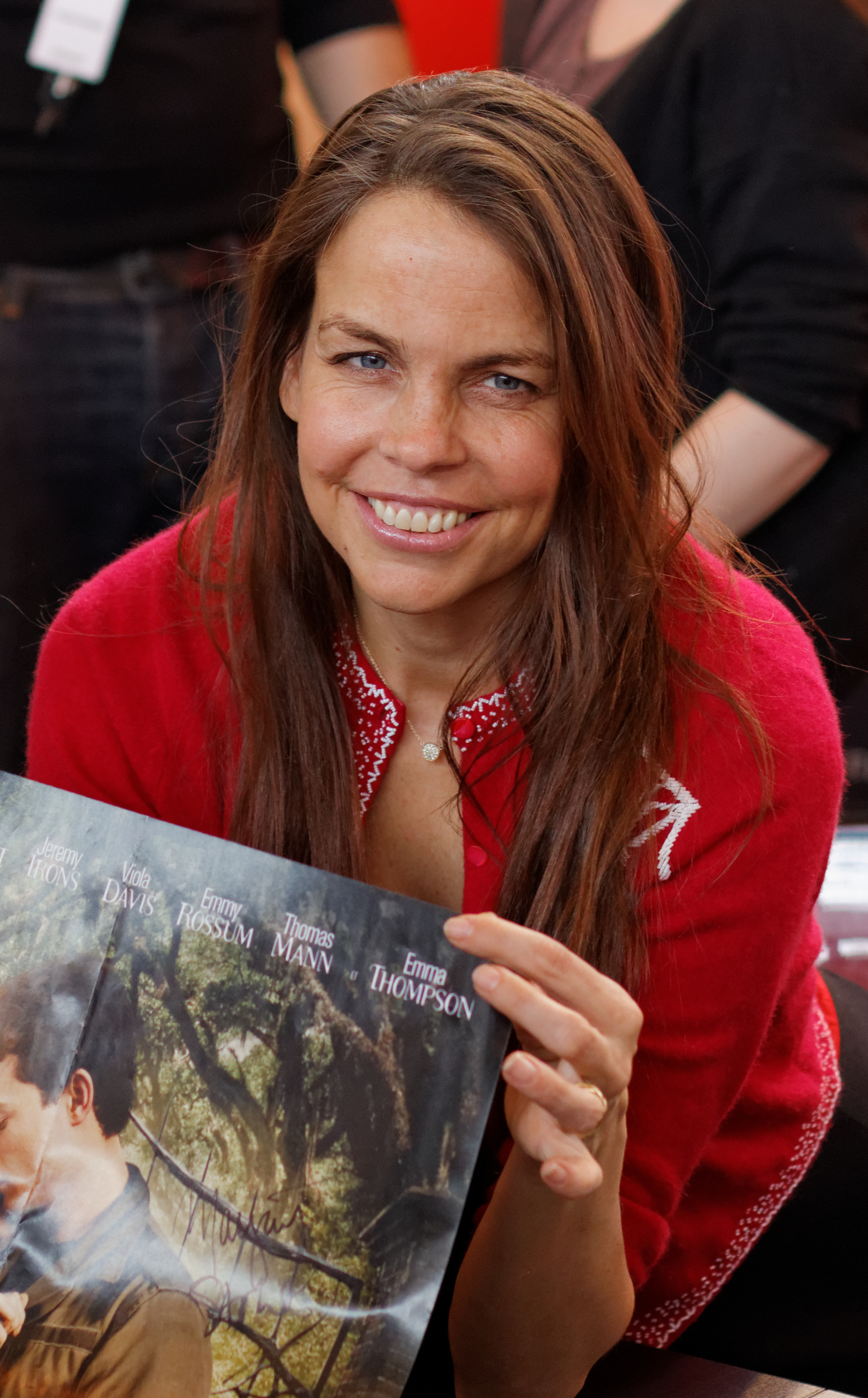 Margaret Stohl, salon du livre de Paris, 2013